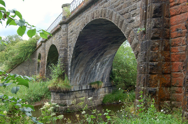 Lyne railway viaduct